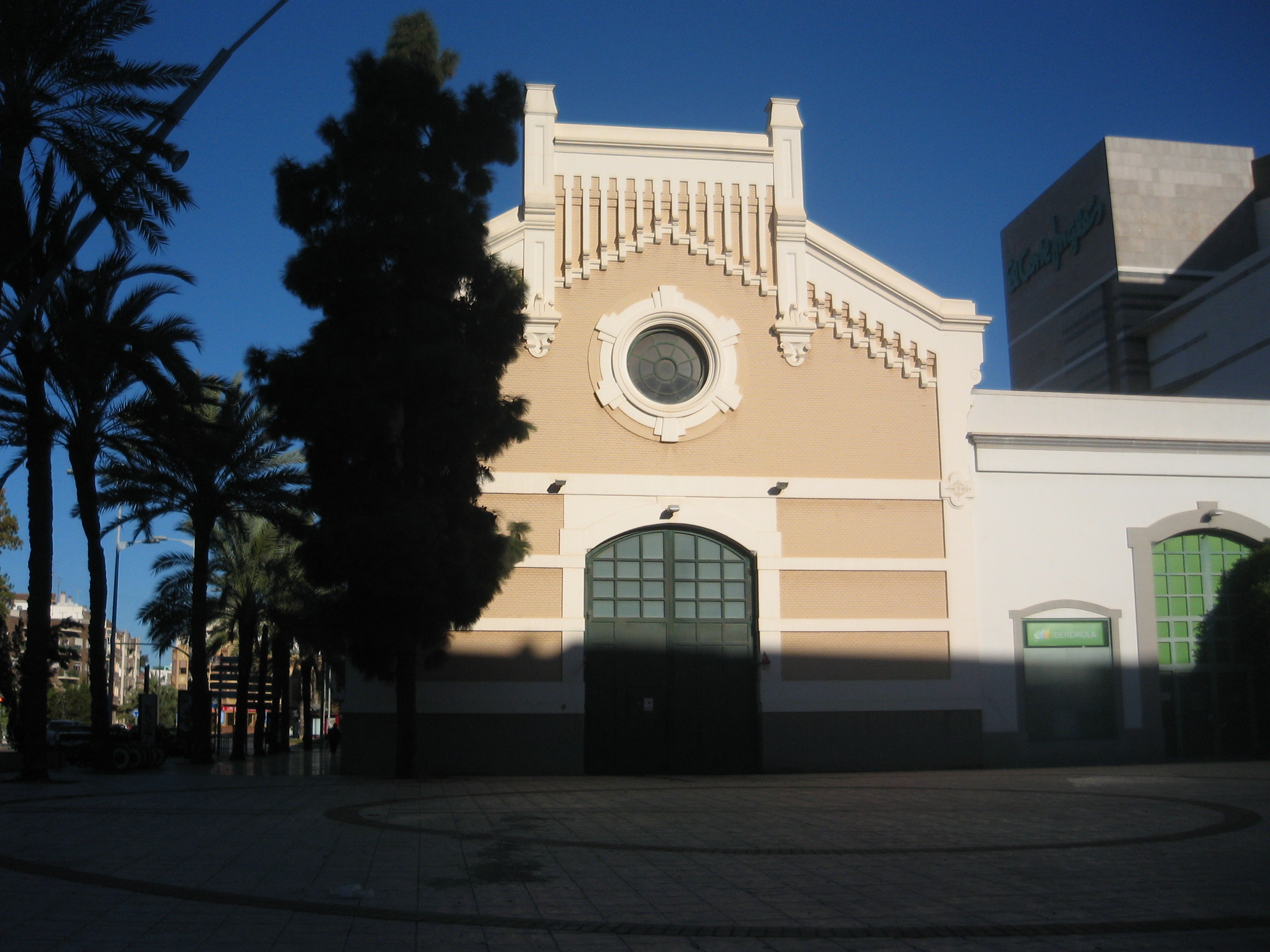 La Fábrica de Fluido Eléctrico Hispania de Cartagena (España).